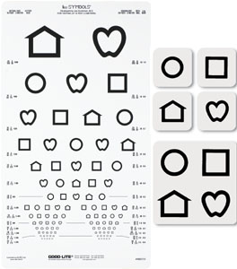 اختبار الأشكال "لي" يتكون من التفاحة والمربع والبيت والدائرة